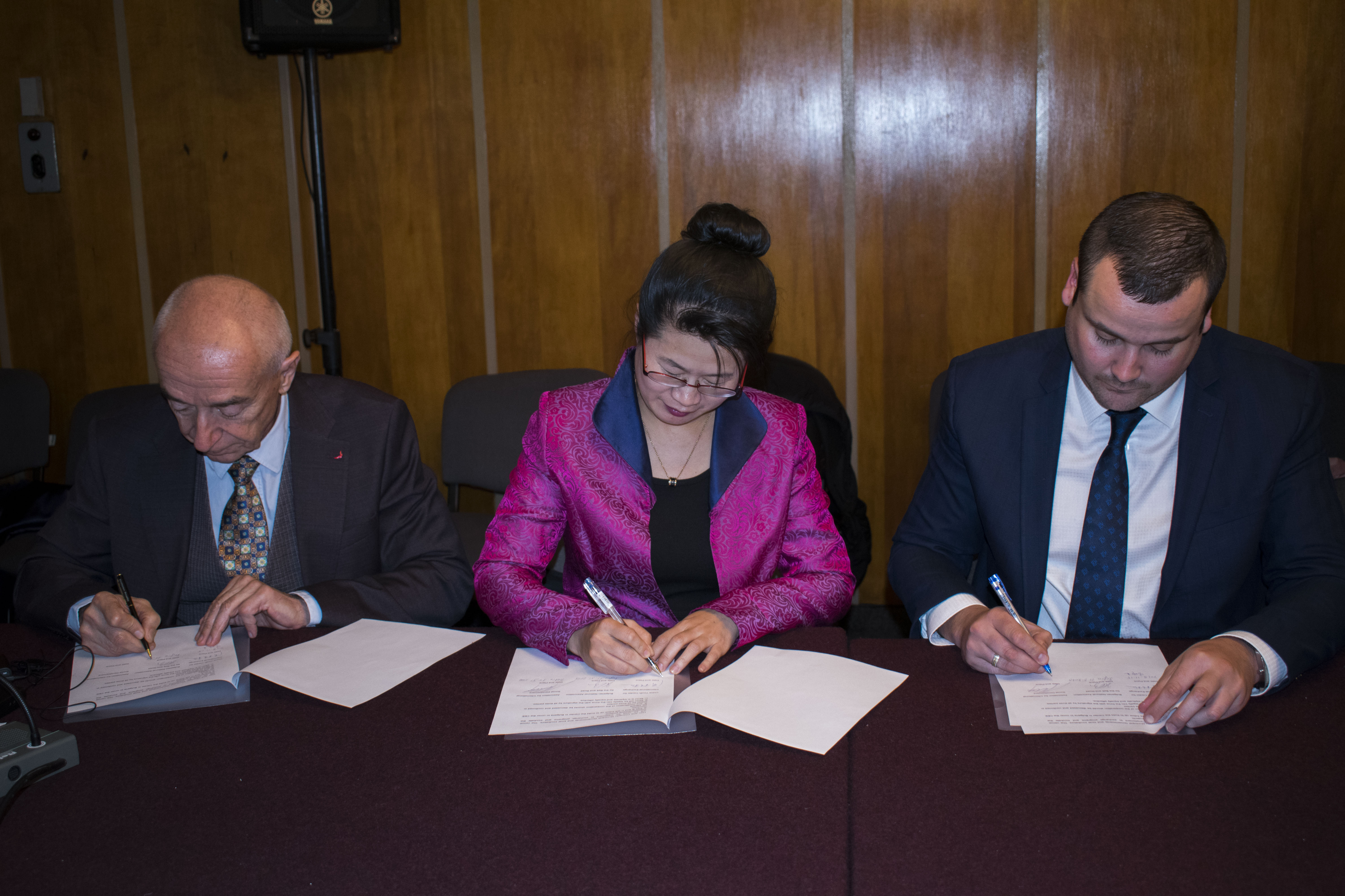 На официална ценеромия в Дома на учения – БАН се подписа международно тристранно споразумение за стартиране на обменна програма между Китай и България, която ще позволи млади лидери и предприемачи от България в различни сфери да посетят Китай и обратно китайски предприемачи да посетят България.